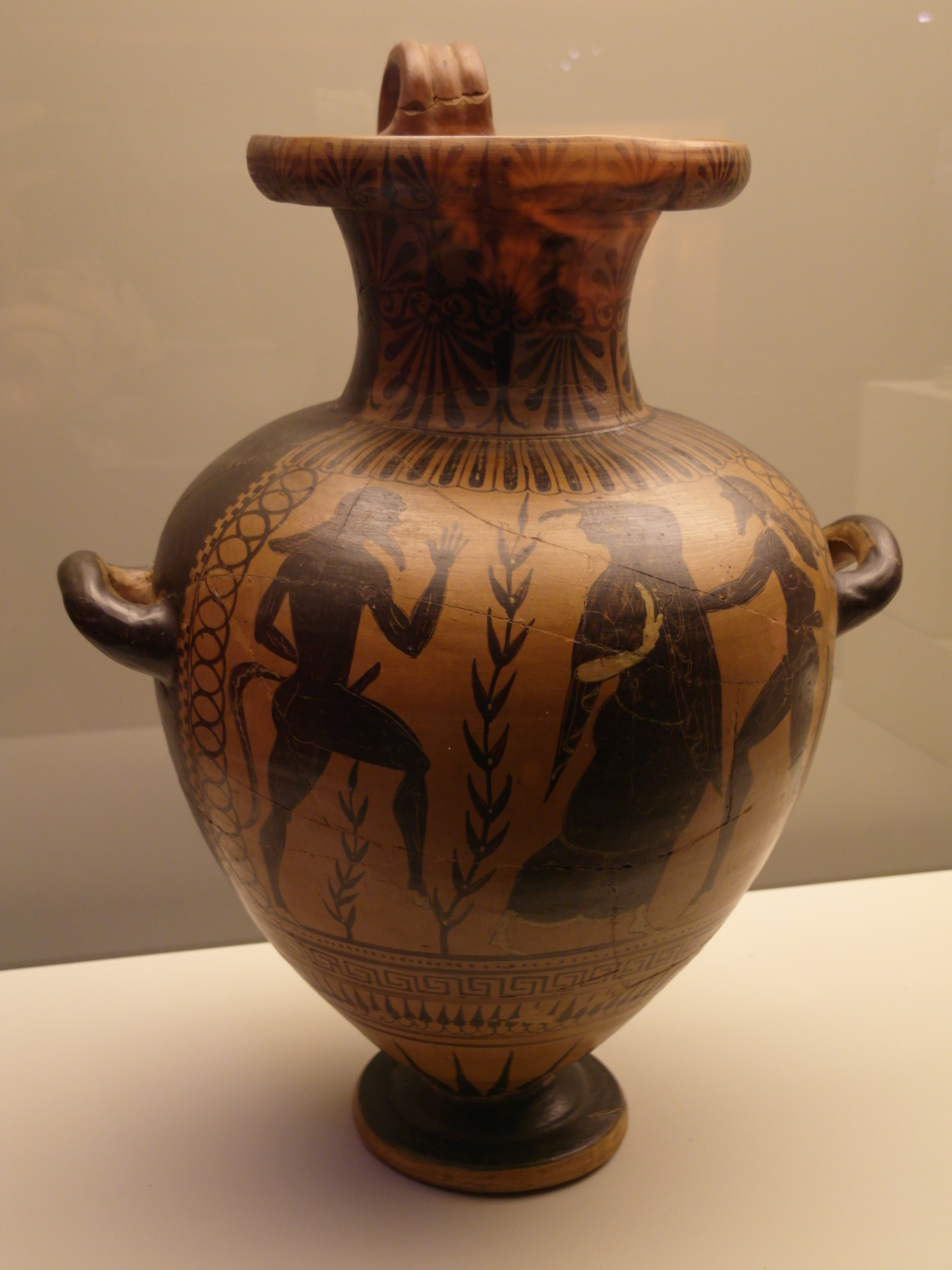 Hidria con ménade y sátiros.